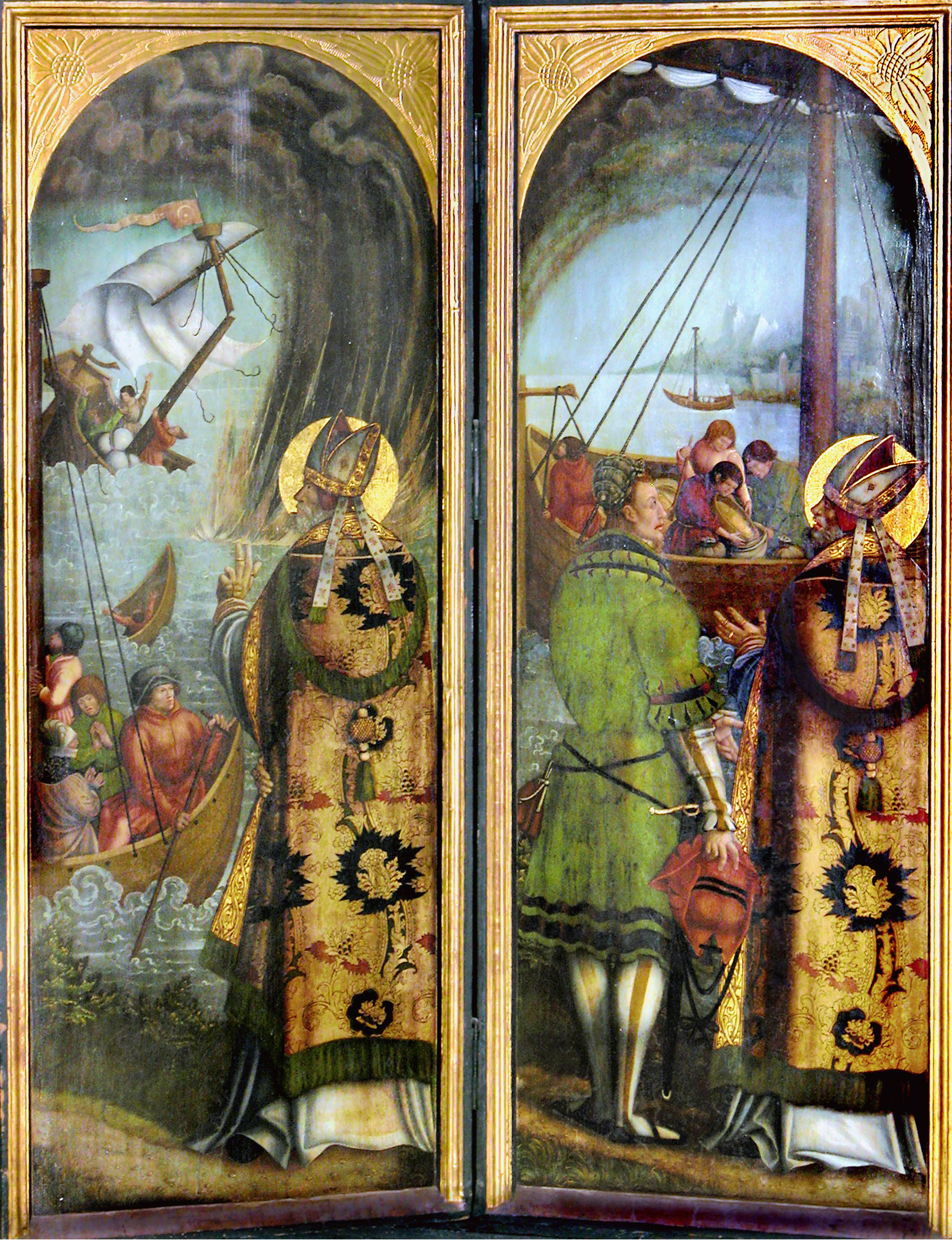 12.09.2011 09627 Oberbobritzsch (Bobritzsch-Hilbersdorf), Kirchstraße (GMP: 50.875369,13.453209): Dorfkirche St. Nicolaus, im Kern mittelalterlich, 1710 erneuert. 3(6)-flügeliger Schnitzaltar (Nikolausaltar) von 1521 von einem unbek. Freiberger Künstler, dem sog. "Bobritzscher Meister". 2 Flügel rechts aufgeklappt: Der hl. Nikolaus beschützt Seefahrer. [DSCNn2750.TIF]201109122325DR.JPG(c)Blobelt